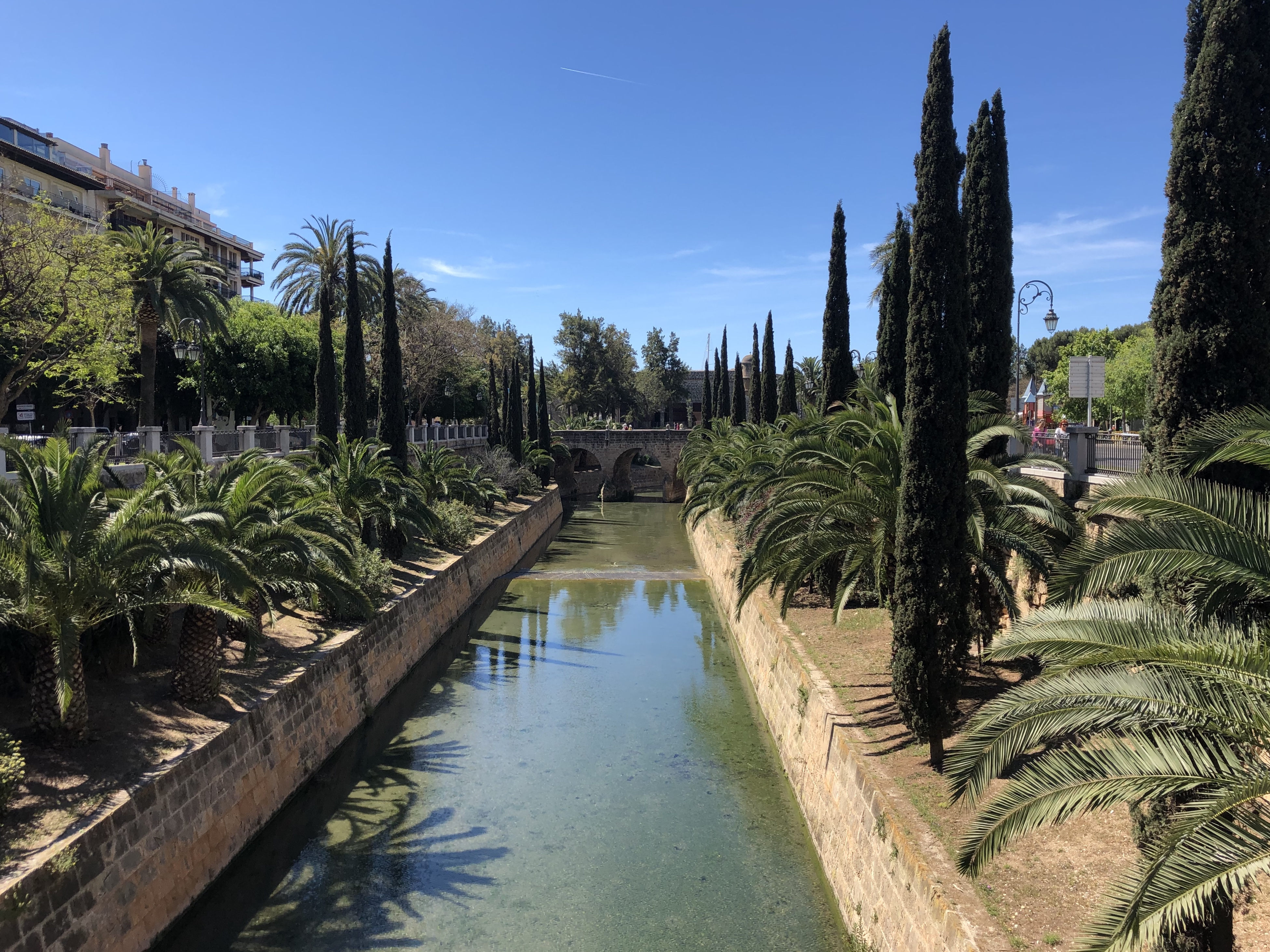 Rzeka przepływająca przez Palmę